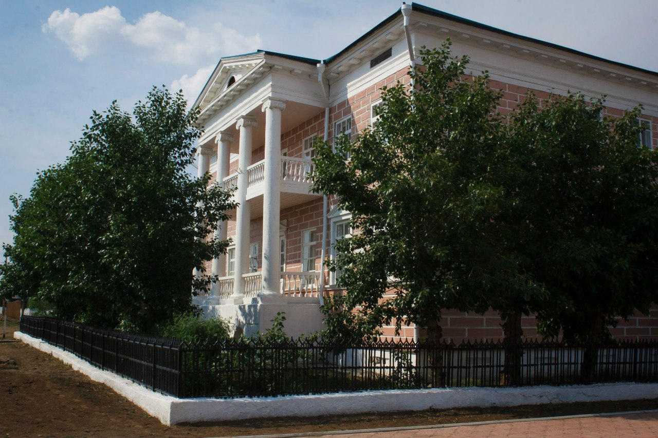 Novoselenginsk. Museum named after N. Bestuzhev.